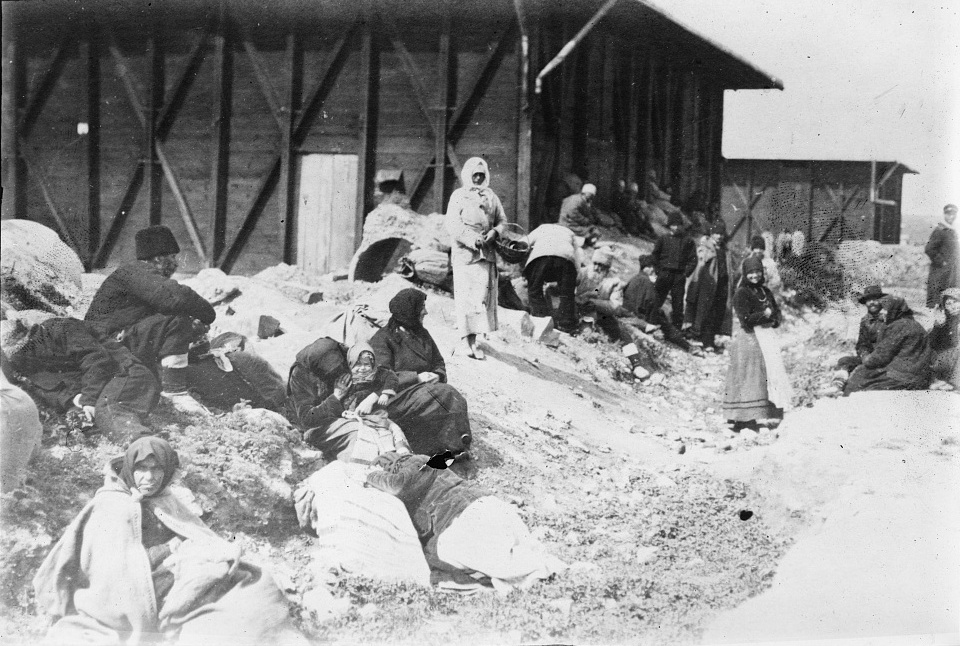 Refugees returning to the Dubroja slept on this bank 2 nights